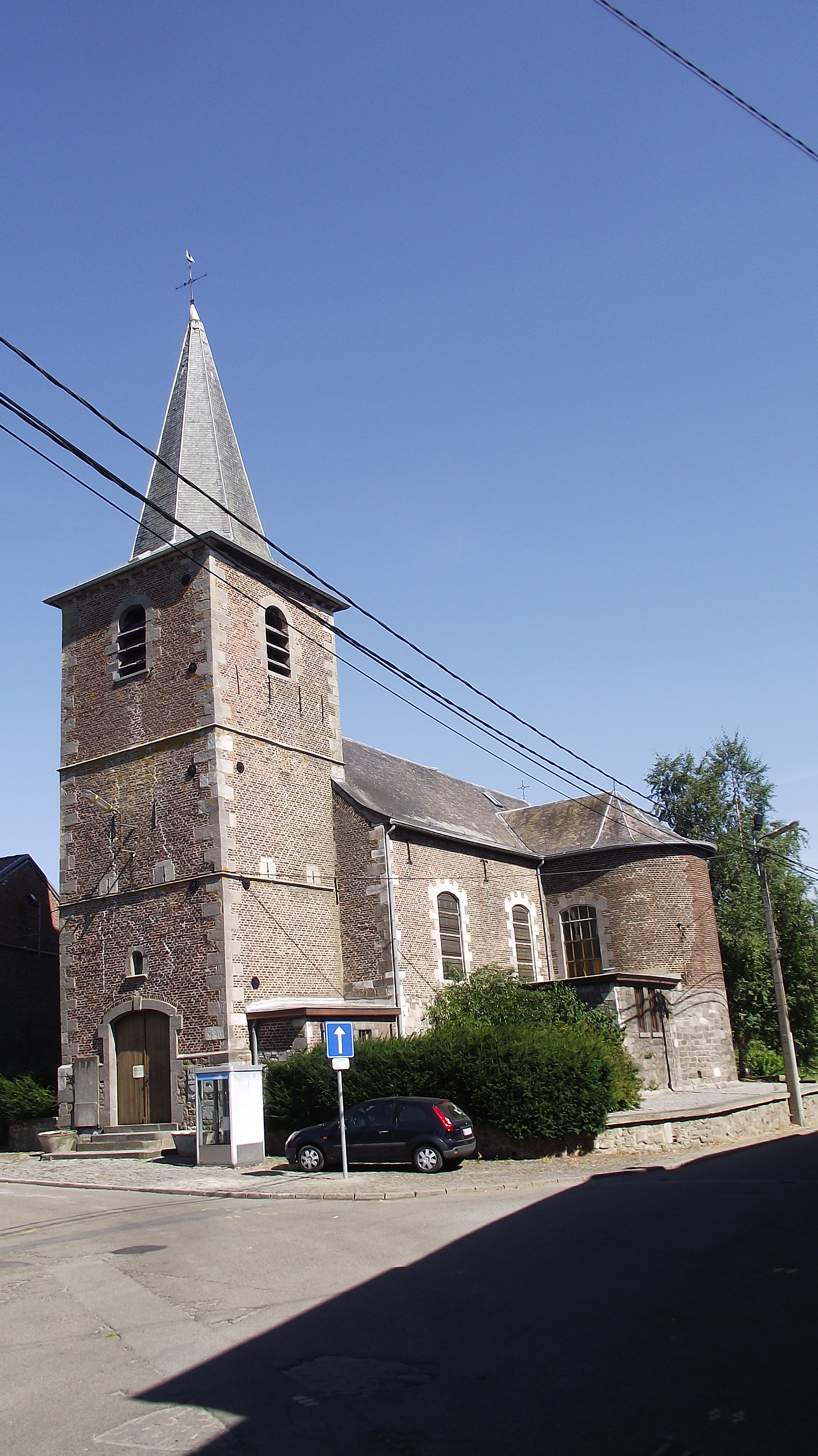 Oude kerk in Brye